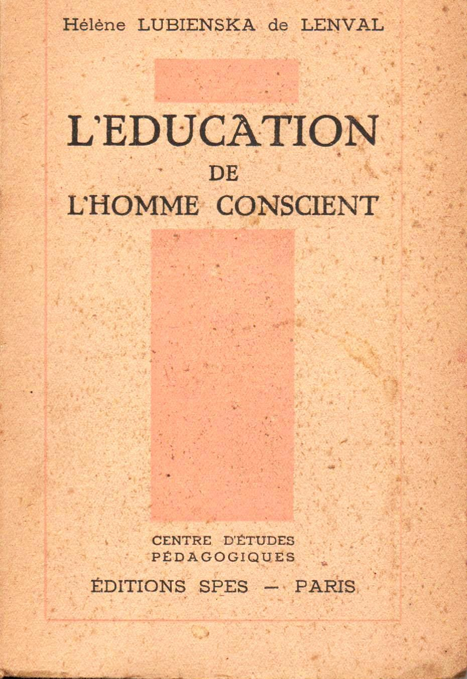 Livre L'Education de l'homme conscient par Hélène Lubienska de Lenval 1948 Editions Spes Paris 127 pp.